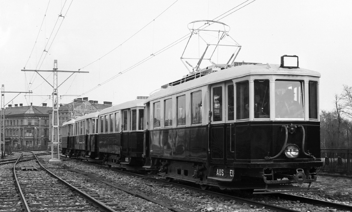 Wiener Elektrische Stadtbahn, Probefahrt in Michelbeuern vor Eröffnung